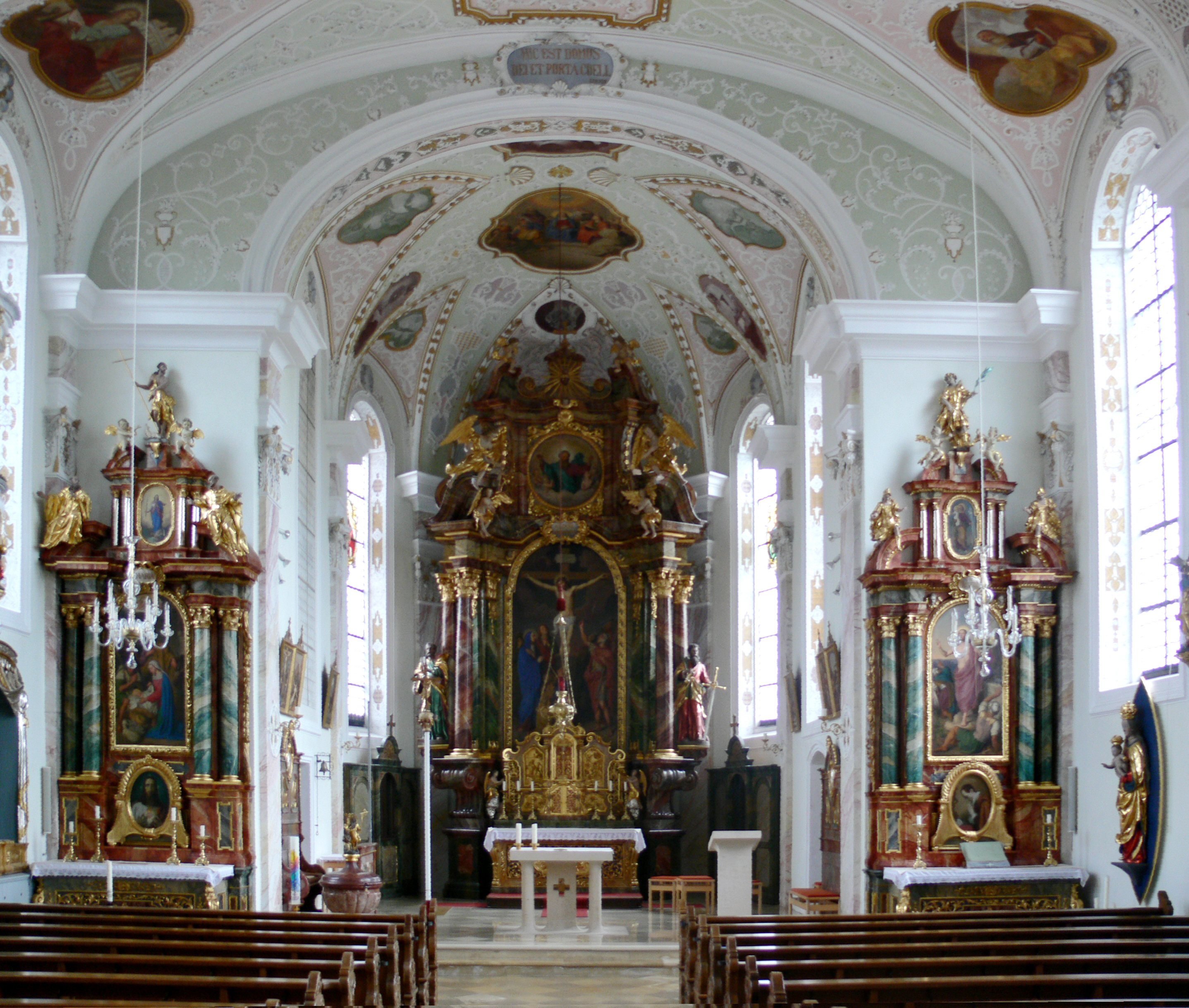 Pfarrkirche St. Peter und Paul, Benningen, Landkreis Unterallgäu Altäre